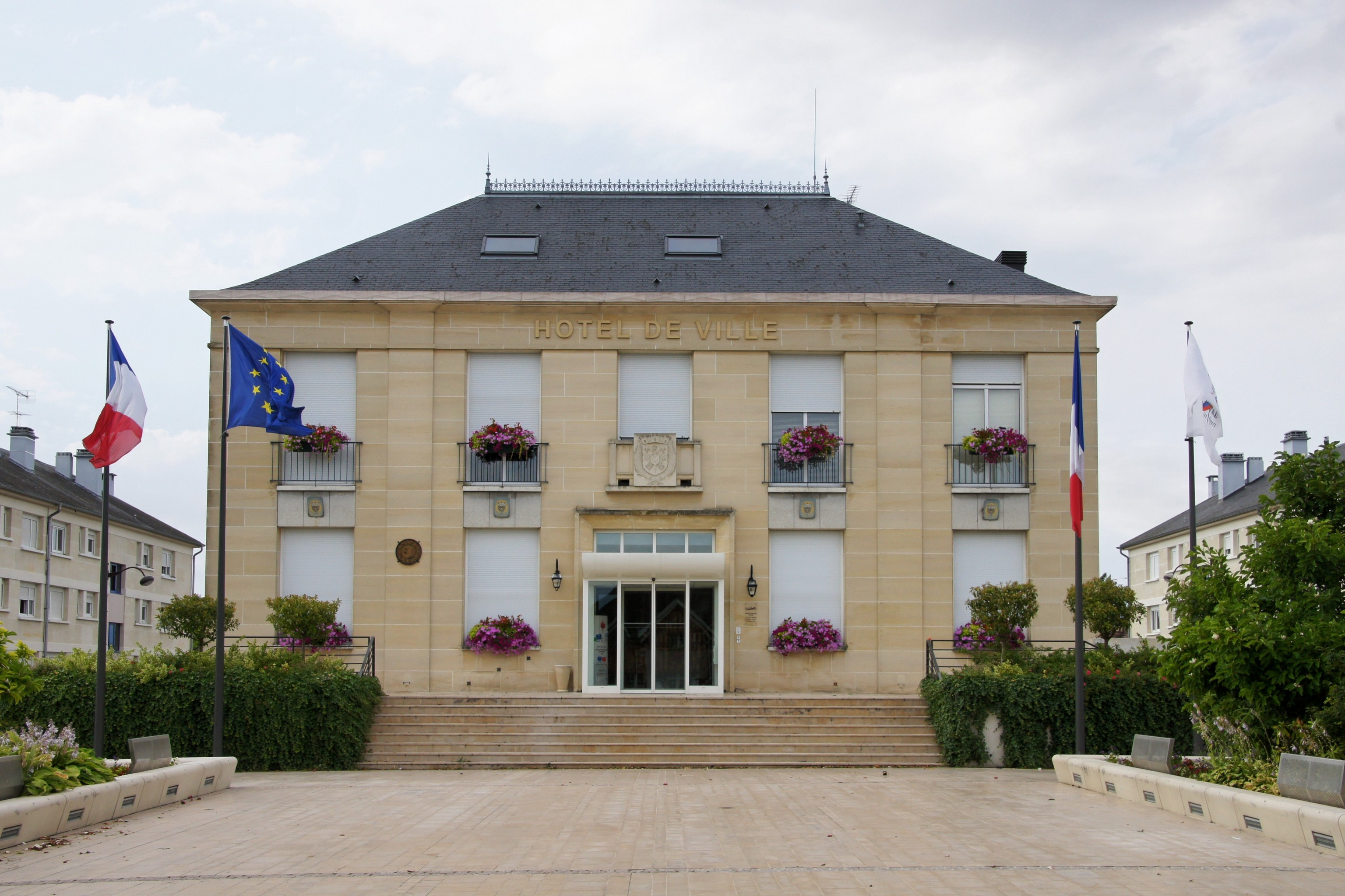 La mairie de Saint André Les Vergers (10)